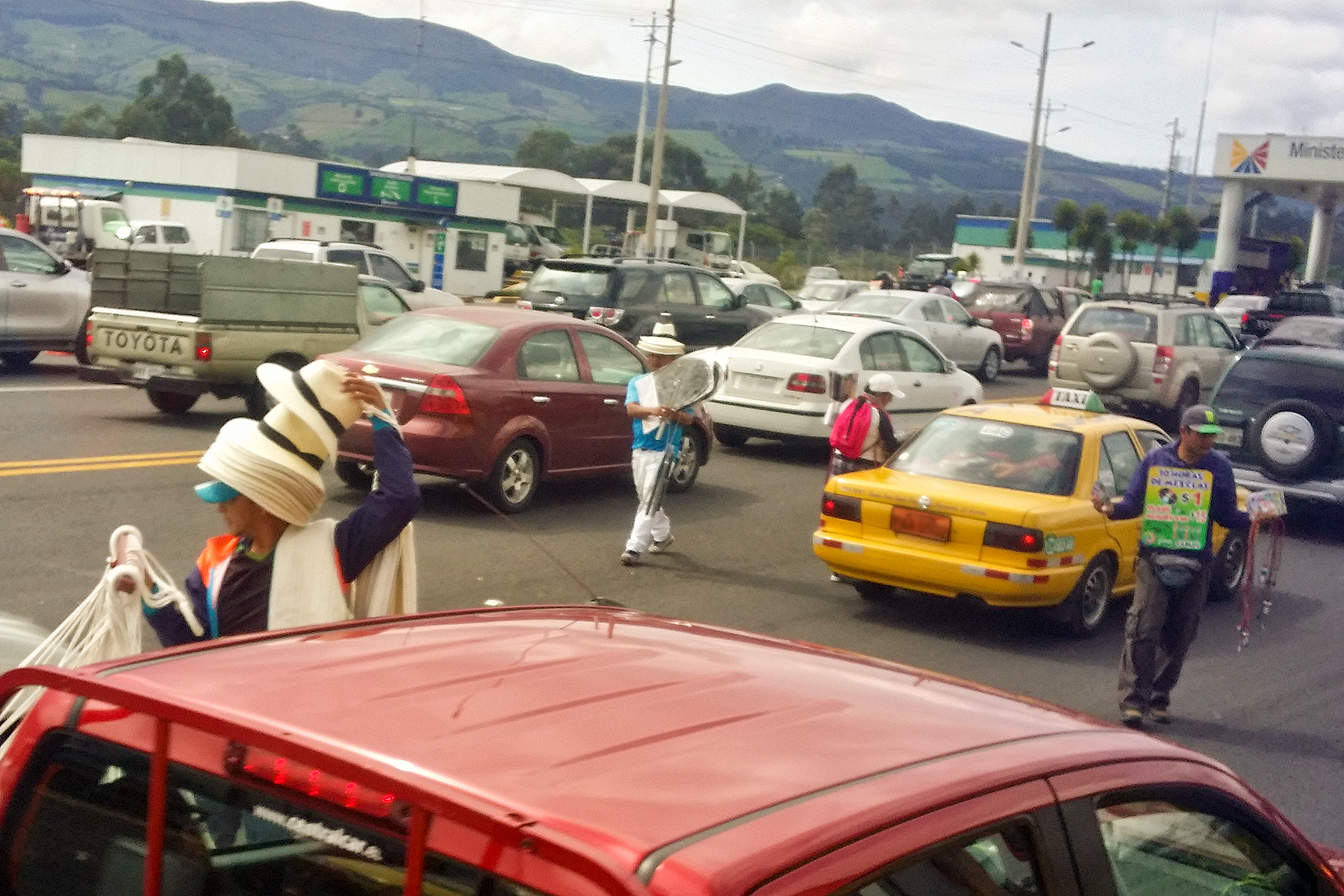 Straßenverkäufer in Ecuador, E35, erste Mautstation südlich von Quito